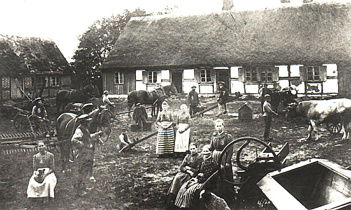 Stålfarfar Nils Gustav Håkansson med familj på gården utanför Västra Karaby år 1894.